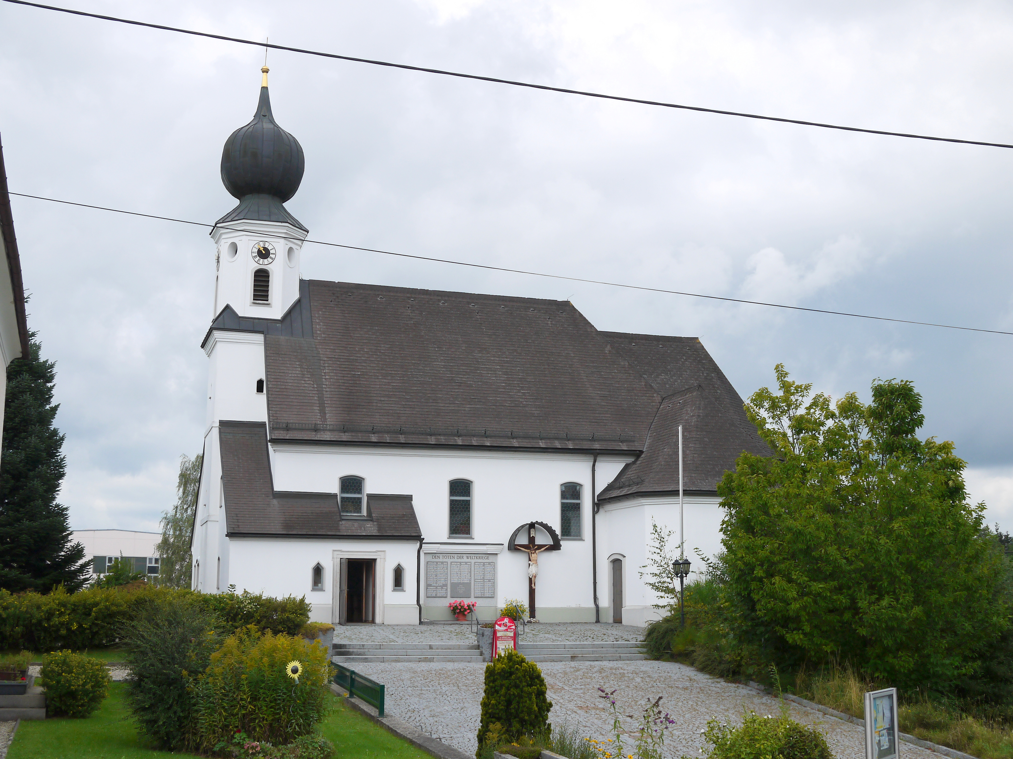 Kath. Pfarrkirche Mariae Heimsuchung